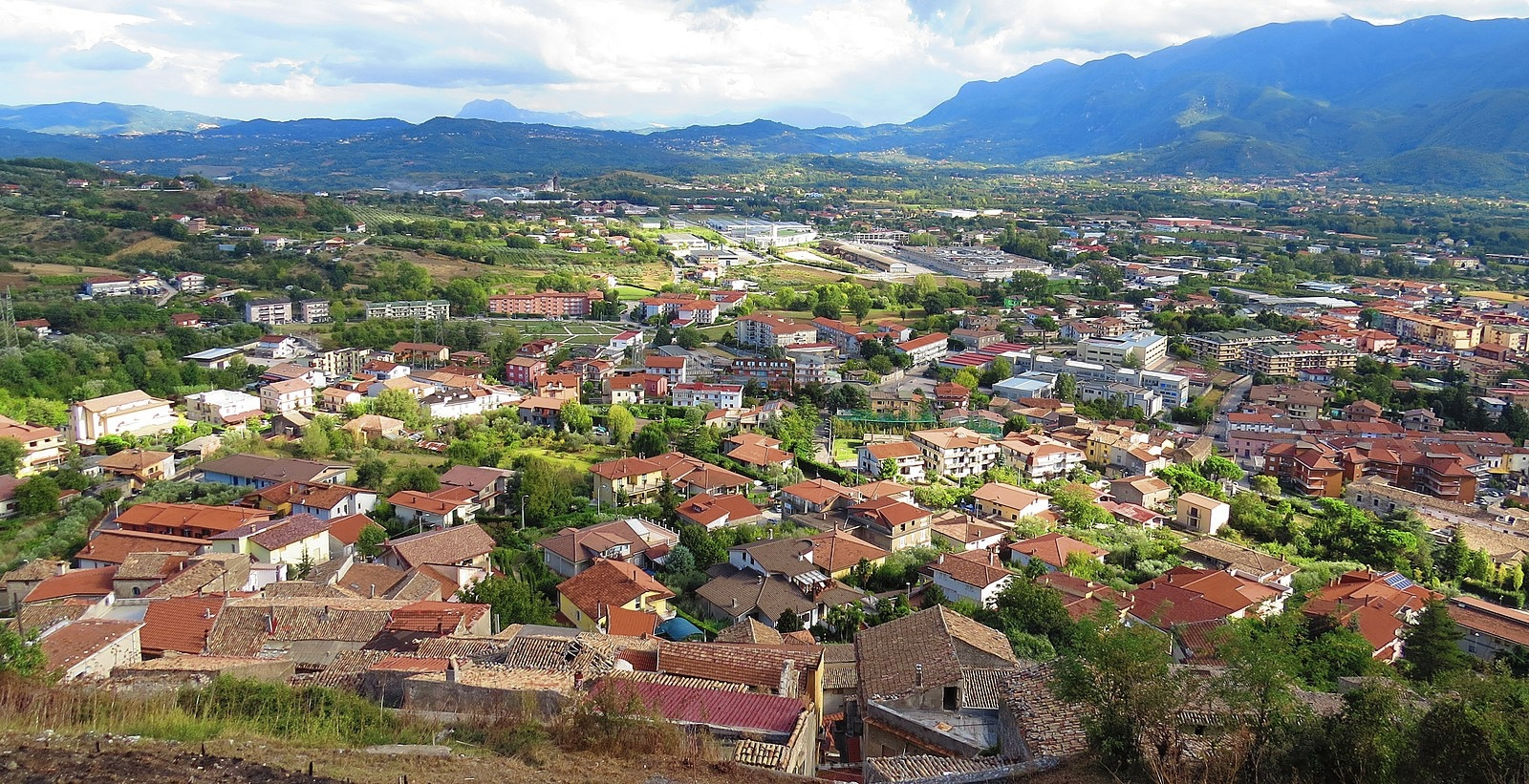 Montesarchio (BN) vista dall'alto